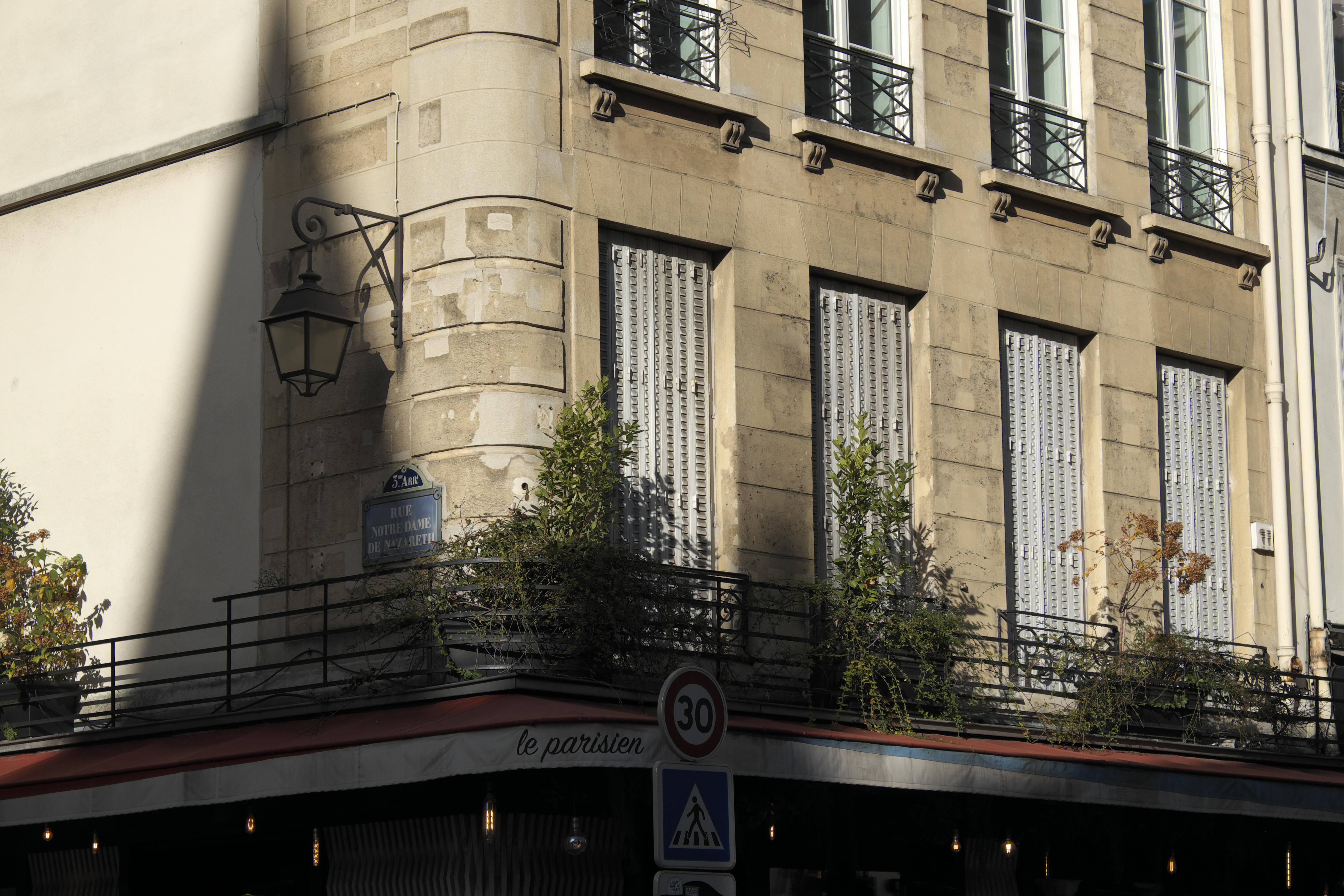 Gebäude, Rue Saint-Martin/Rue Notre-Dame-de-Nazareth, im 3. Arrondissement in Paris (Île-de-France/Frankreich)